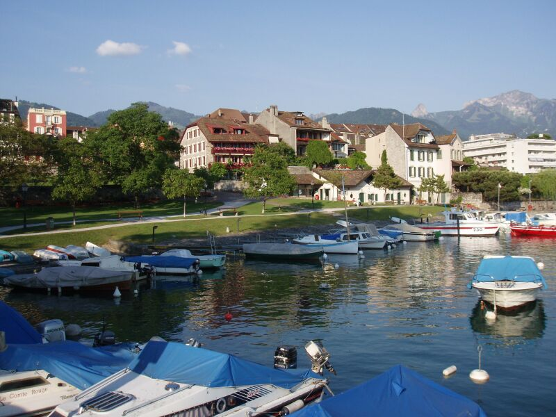 Bootshafen von La Tour-de-Peilz am Genfersee